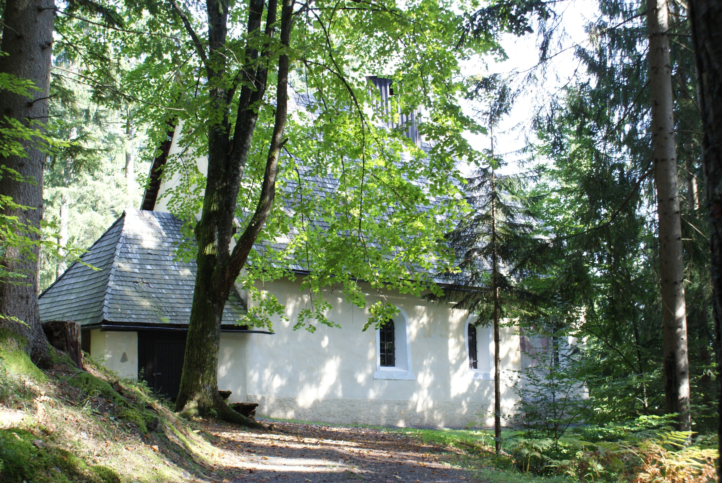 Kath. Filialkirche hl. Christoph am Hum